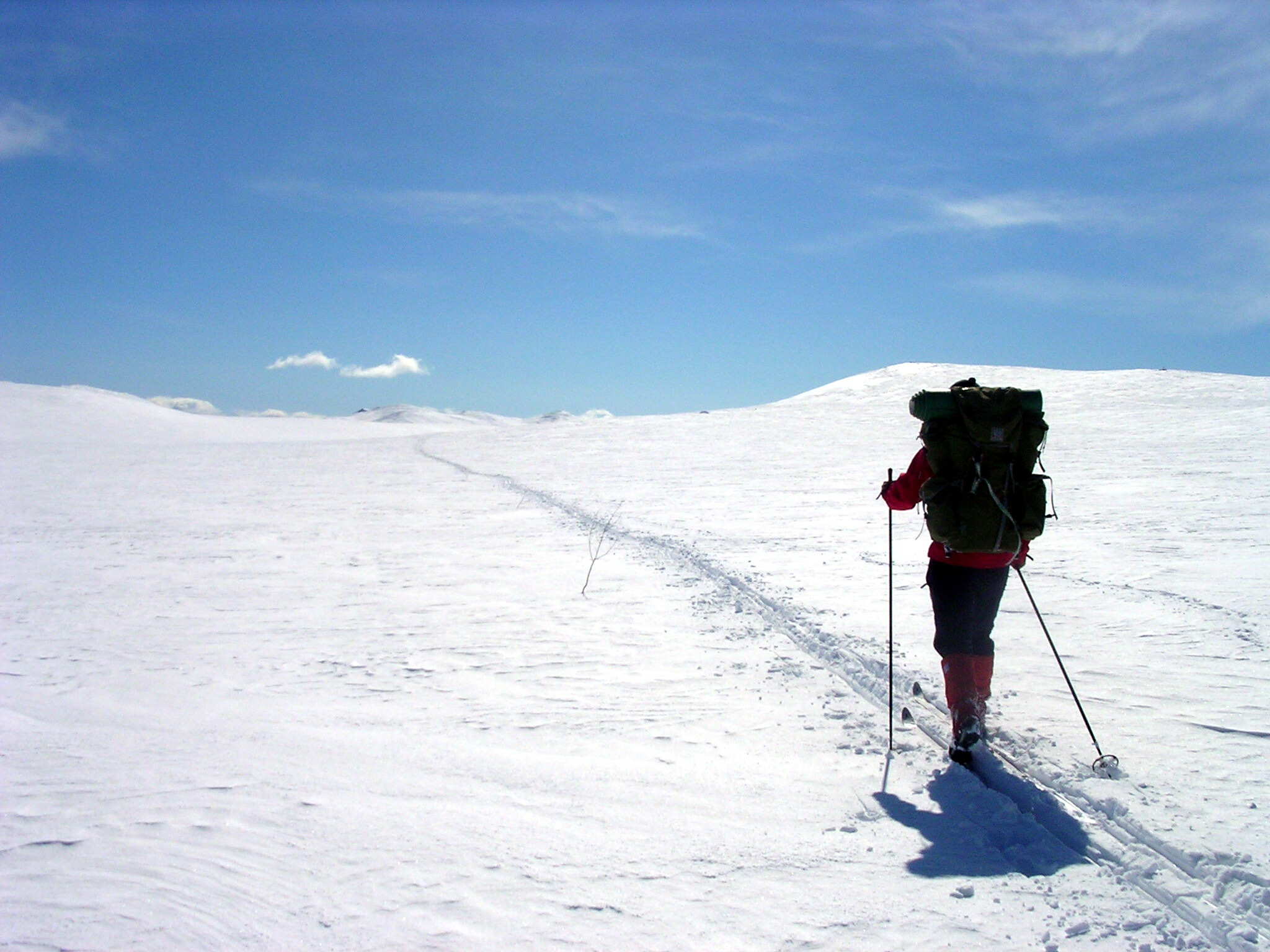 Snow and skiing on Hardangervidda, near Vegglifjell, Norway.